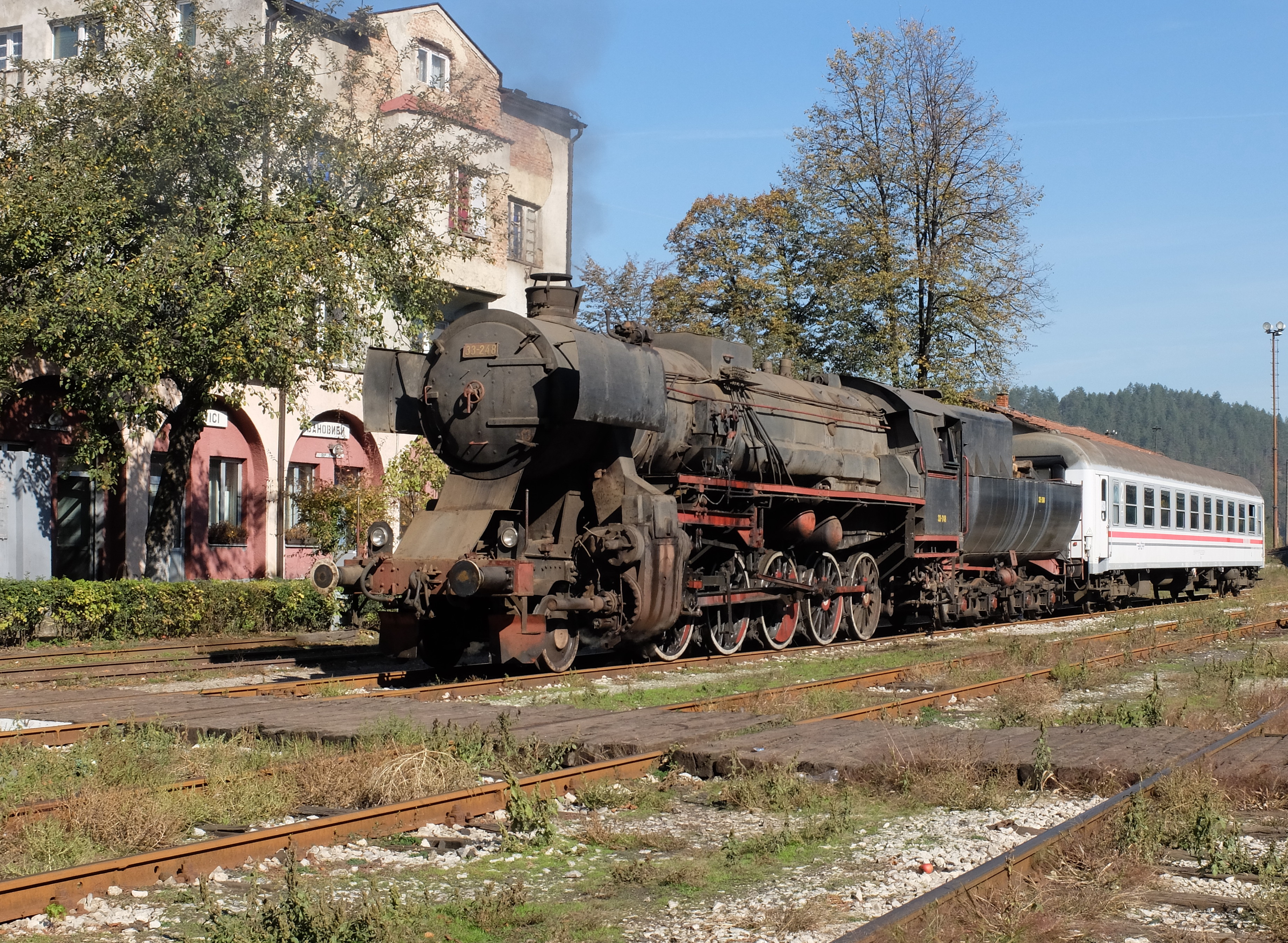 Bahnhof Banovići mit 33-248